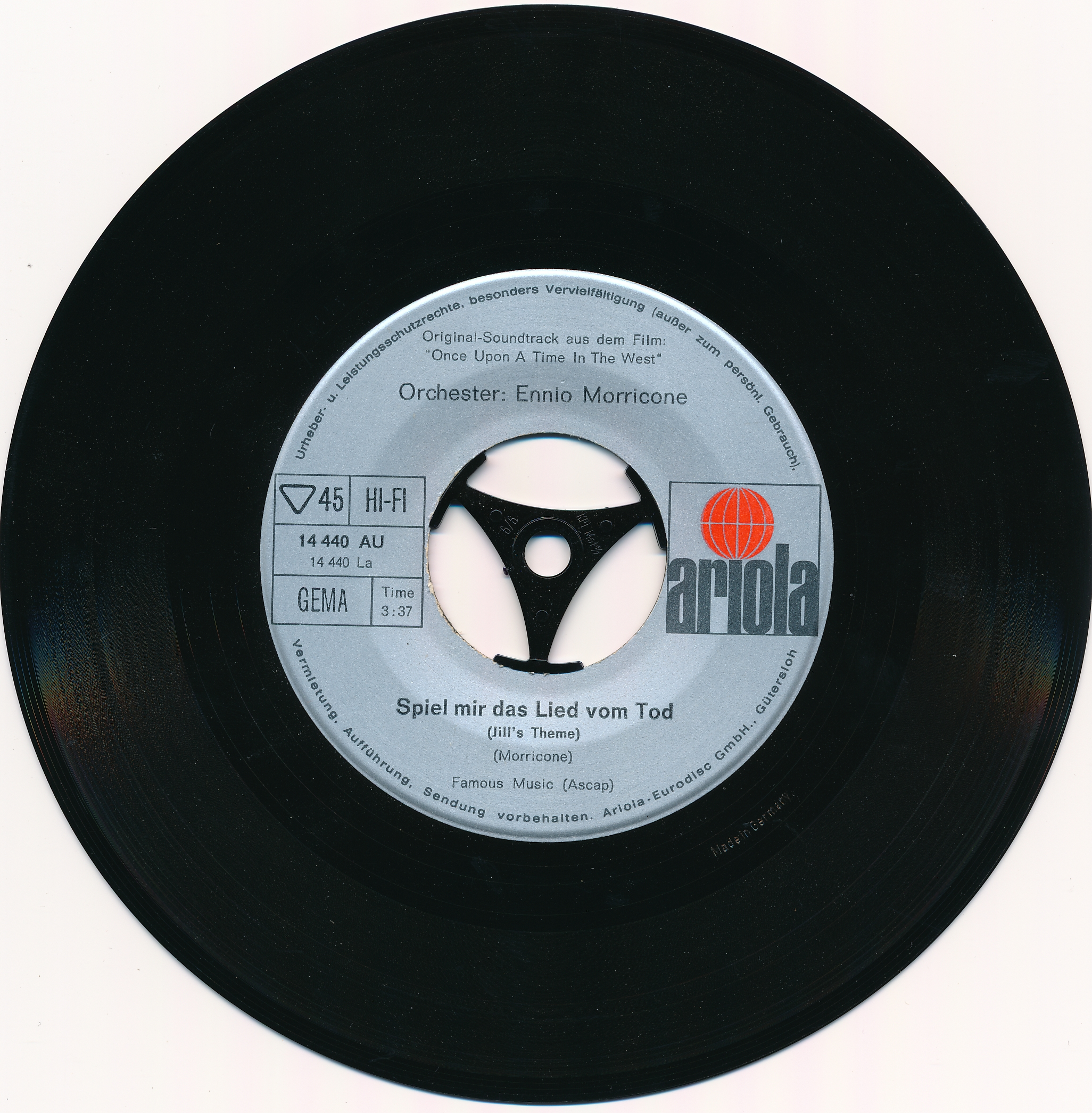 Ariola Single-Schallplatte 1967 bis 1987